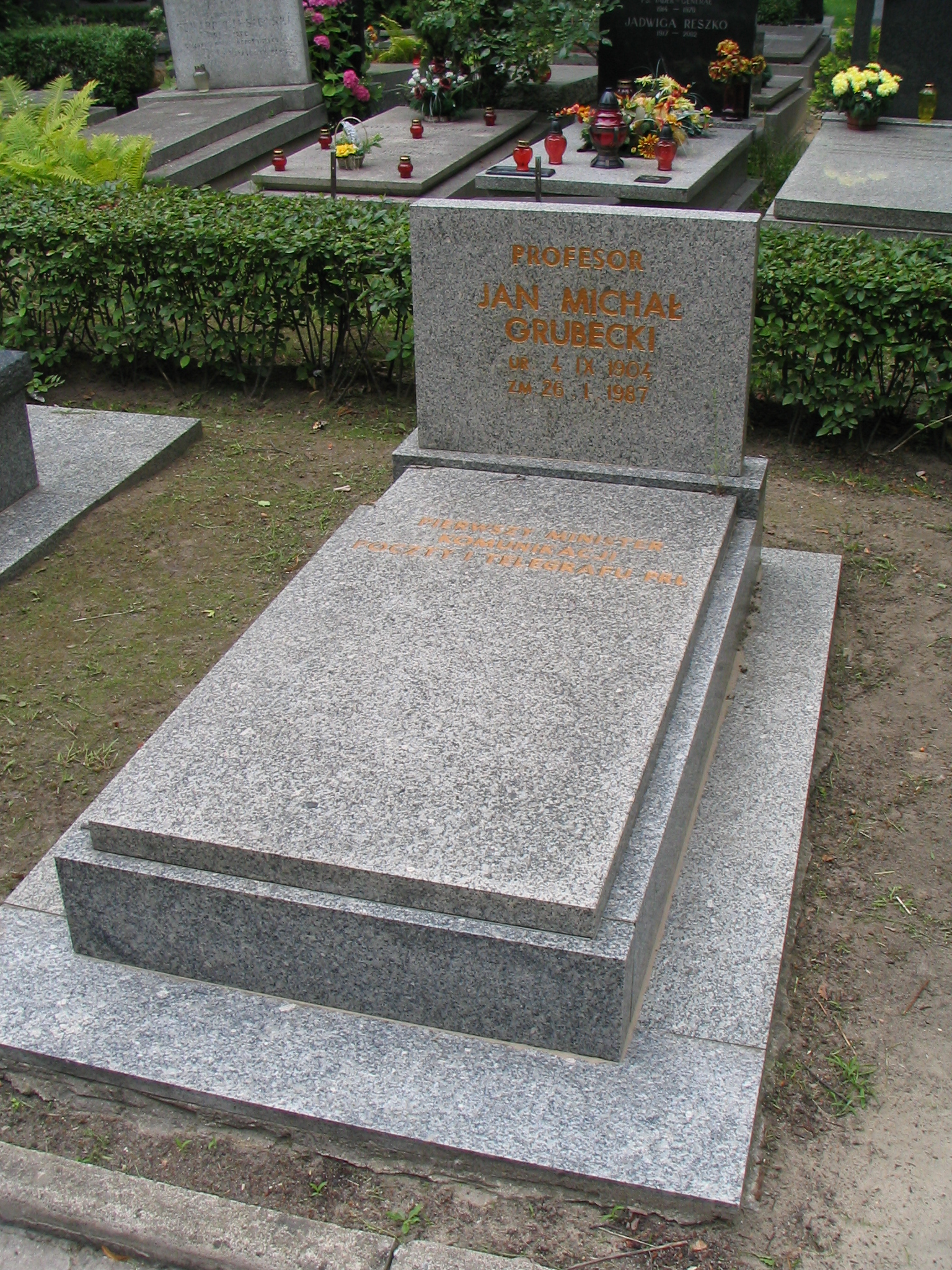 Grób prof. Jana Michała Grubeckiego